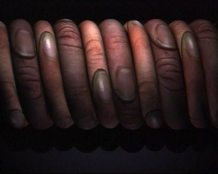 Image extraite de Digitaline, film d'animation de Bériou.